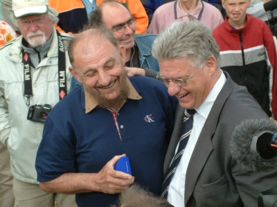 Miletic en Vreeman bij de onthulling van De Houtwerker (Eigen foto Jan Lapère)